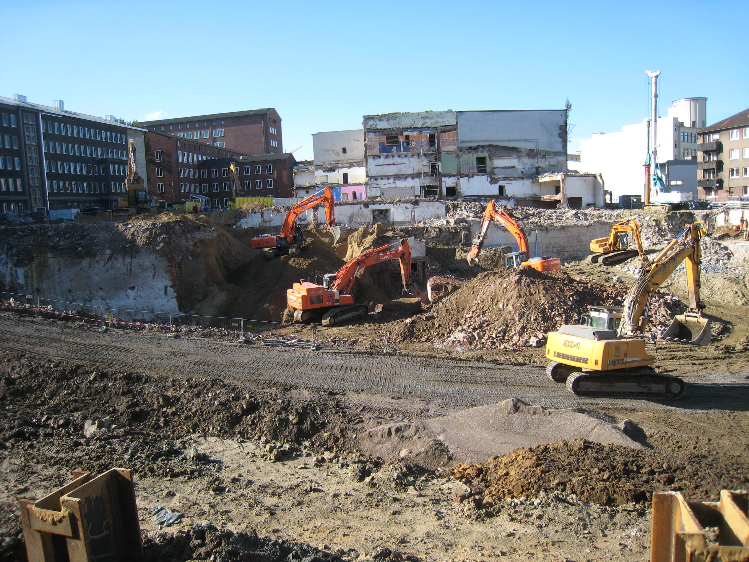 Abriss der Thier Brauerei Dortmund